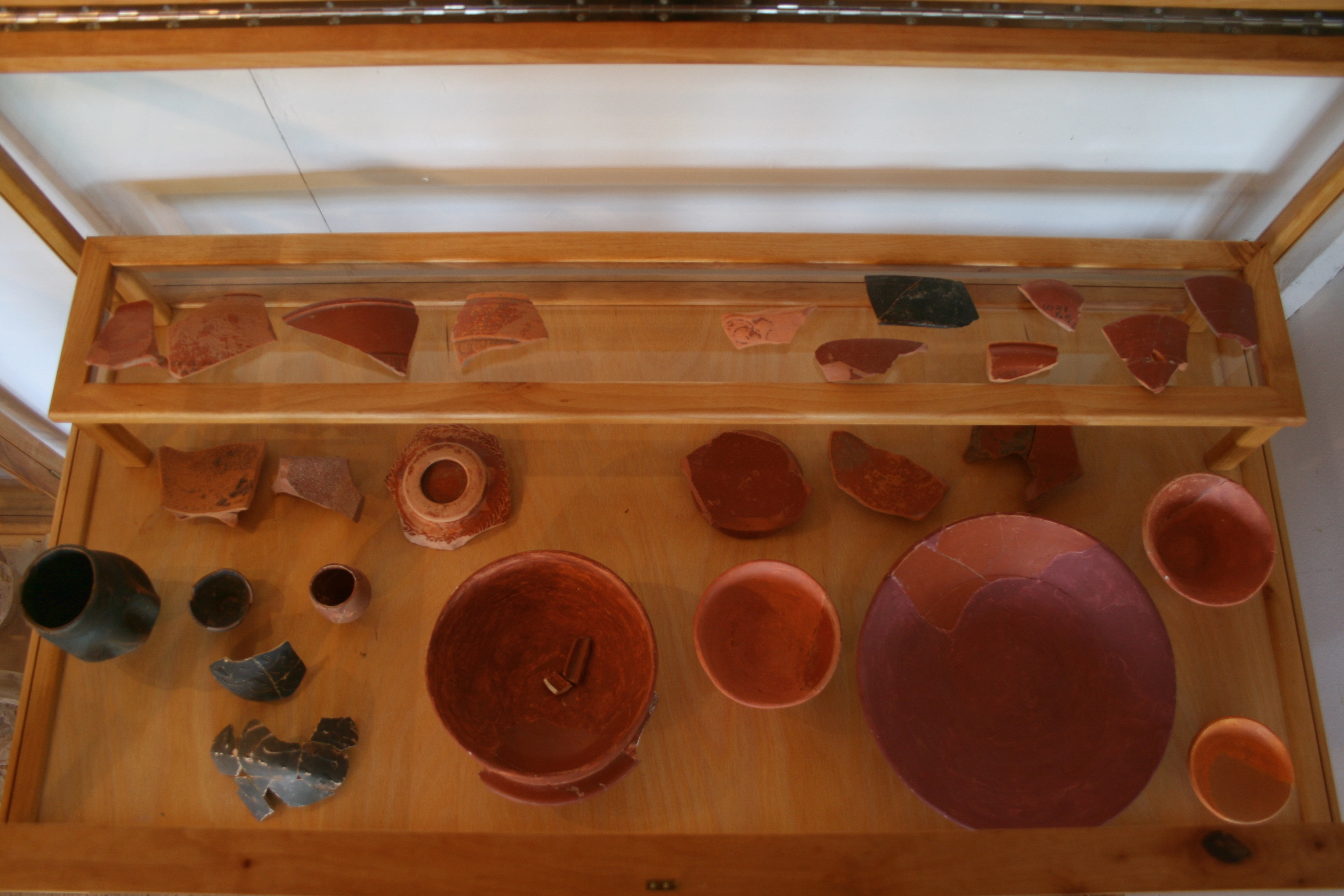 Römische Villa Haselburg im Odenwald, Hessen, Feinkeramikfunde (meist Terra Sigillata)